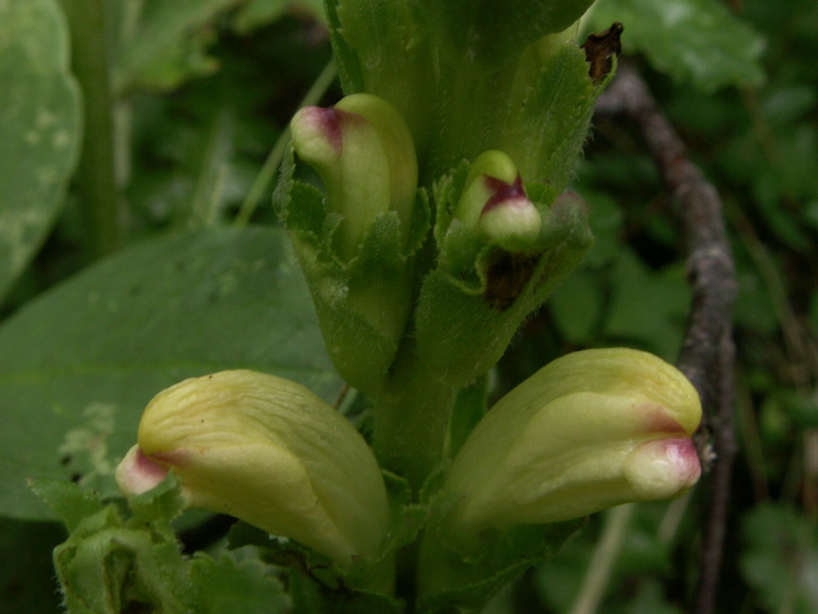 Pedicularis sceptrum-carolinum, flora